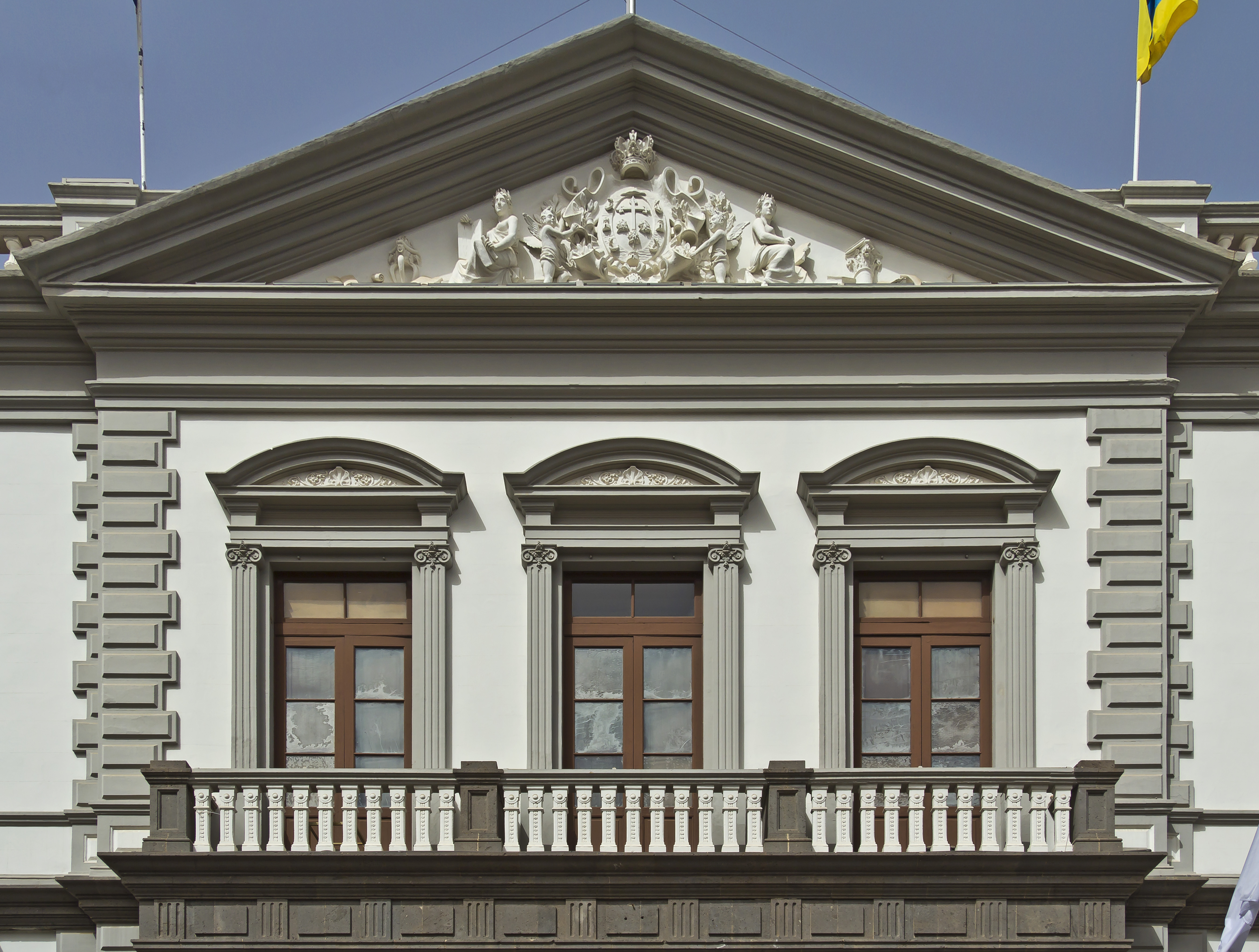 Das Rathaus der Stadt Santa Cruz de Tenerife wurde von dem Architekten Antonio Pintor y Ocete entworfen. Es wurde im Jahr 1916 fertiggestellt.